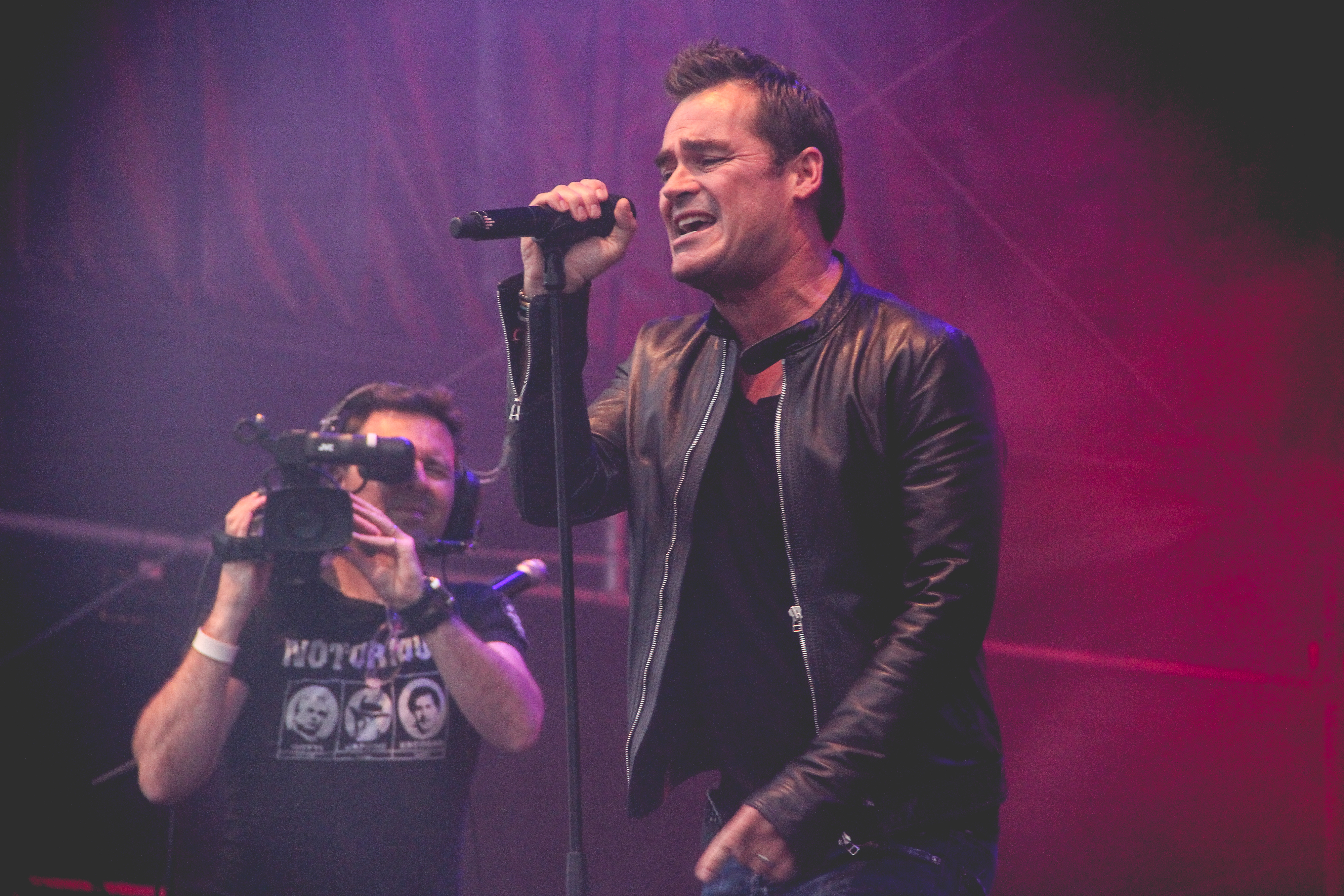 Optreden van Jeroen van der Boom op 26 juni 2015 tijdens opening Raadhuisplein in Emmen